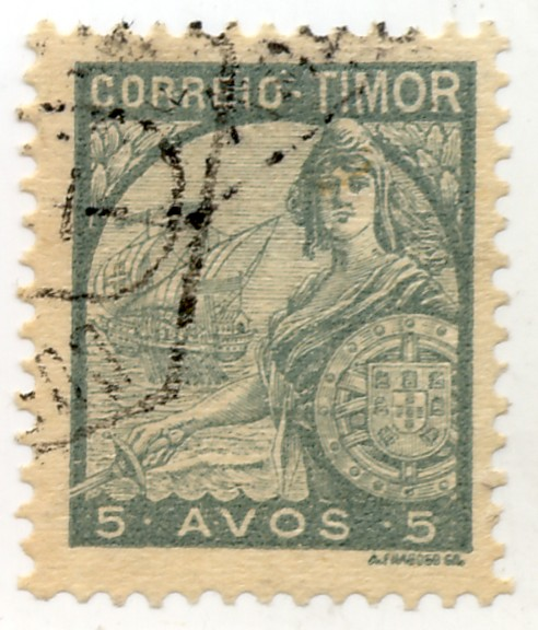 Briefmarke von Portugiesisch-Timor. Wert: 5 Avos